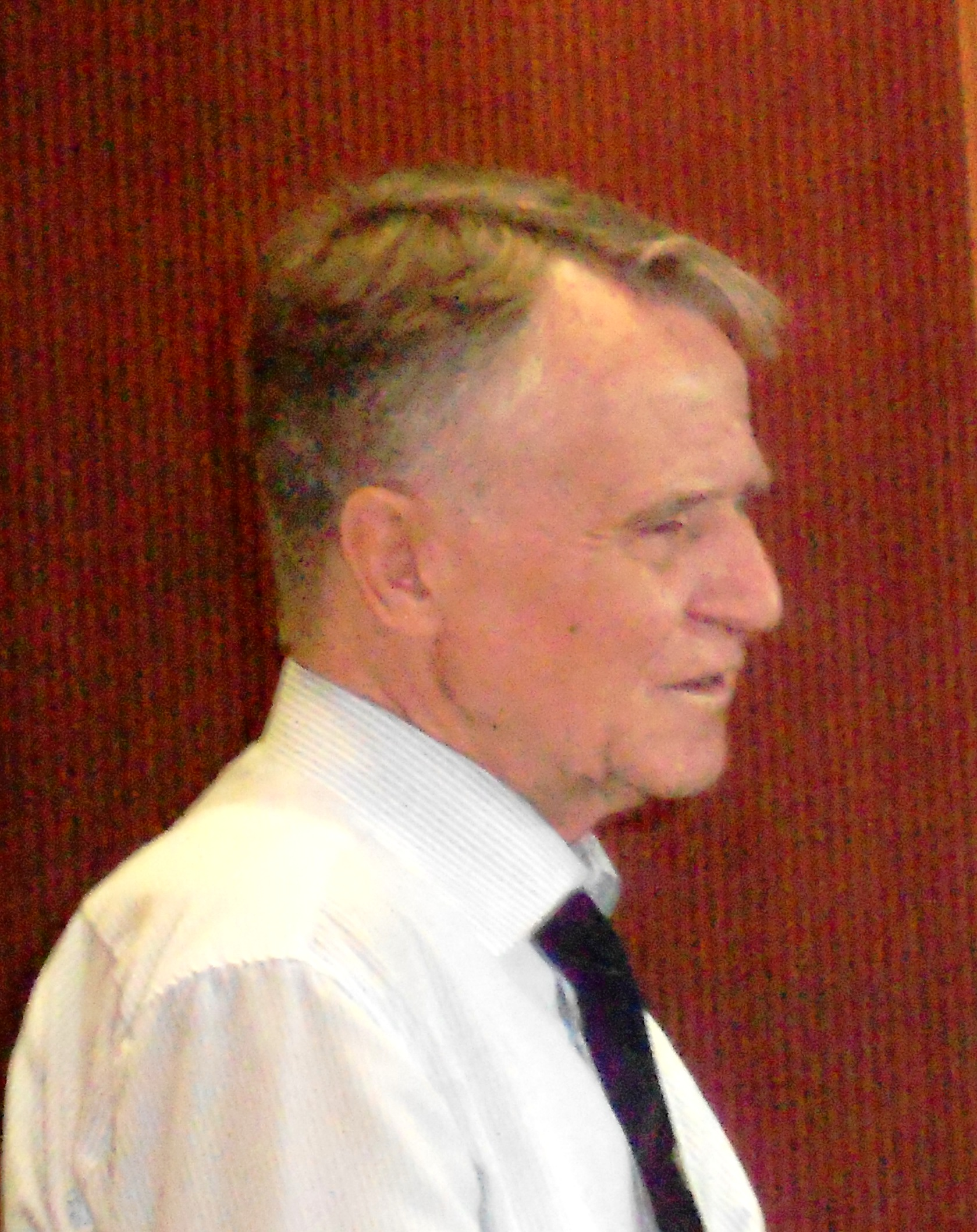 Hans-Ulrich Klose